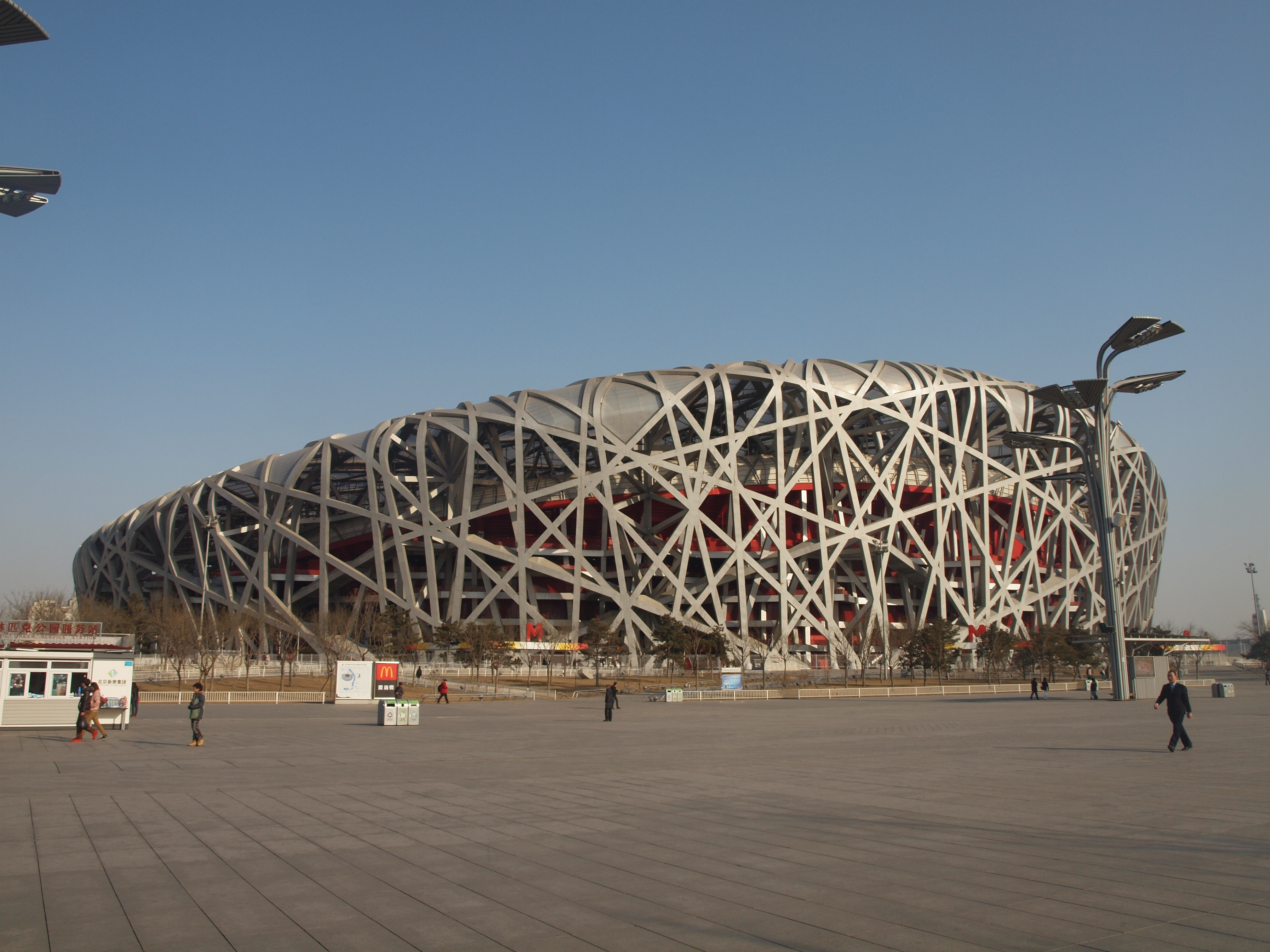 Beijing National Stadium 2012